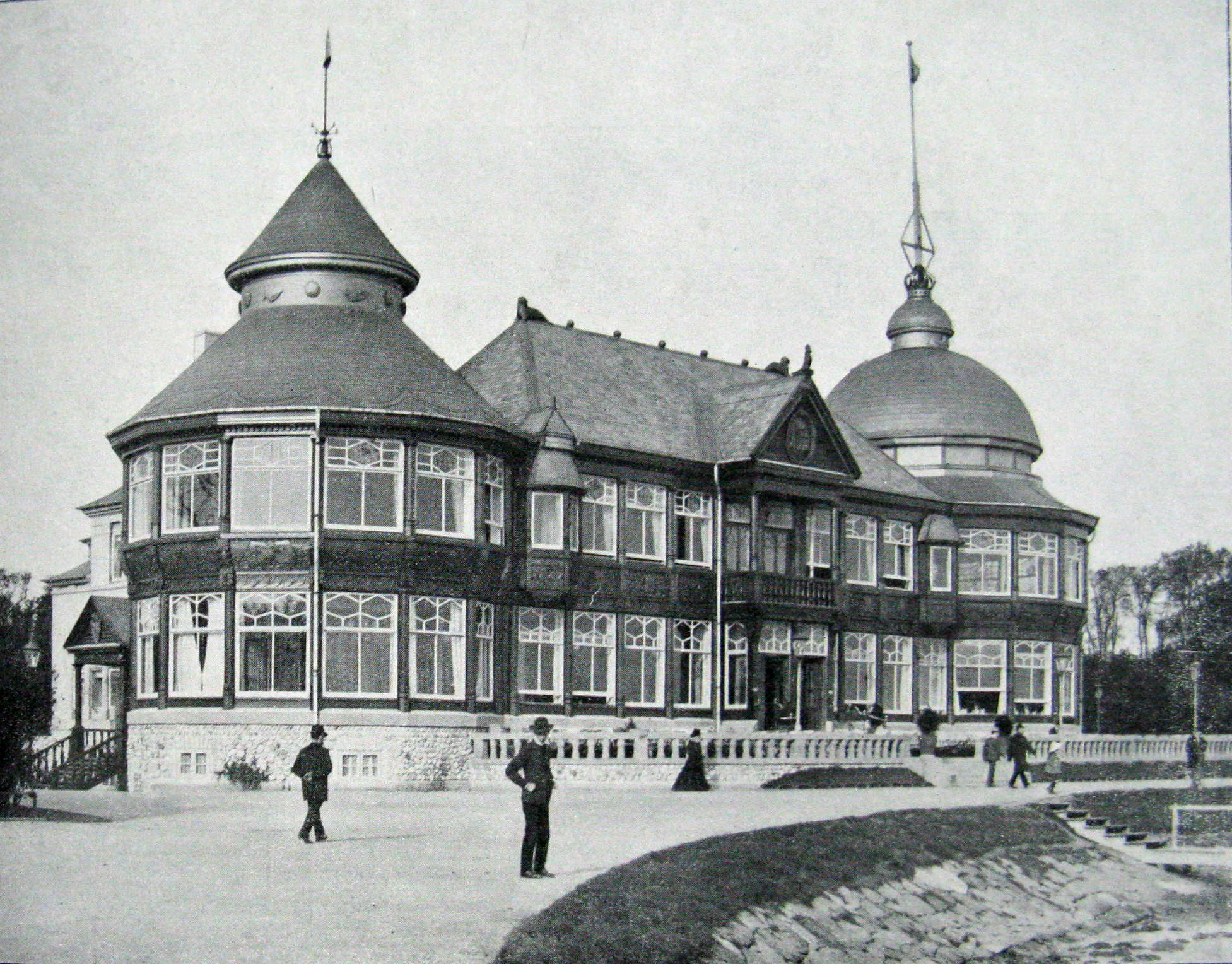 Langelinje Pavillionen opført af KBH's kommune 1901-2 Paa 1. sal har Kgl.dansk Yachtklub Lokaler